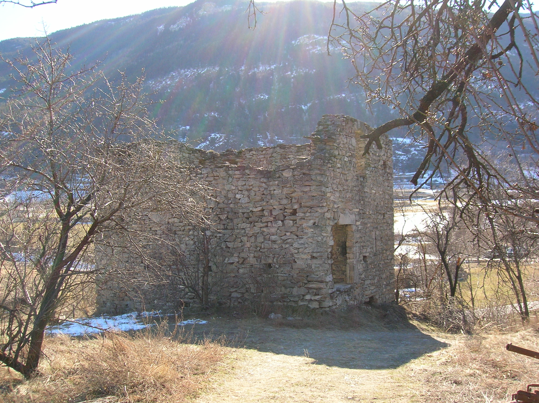 Torre dei Salassi in inverno, a Jovençan, Valle d'Aosta, Italia.